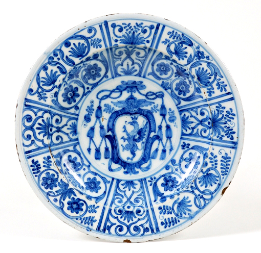 Grande piatto con decorazione calligrafica e stemma.